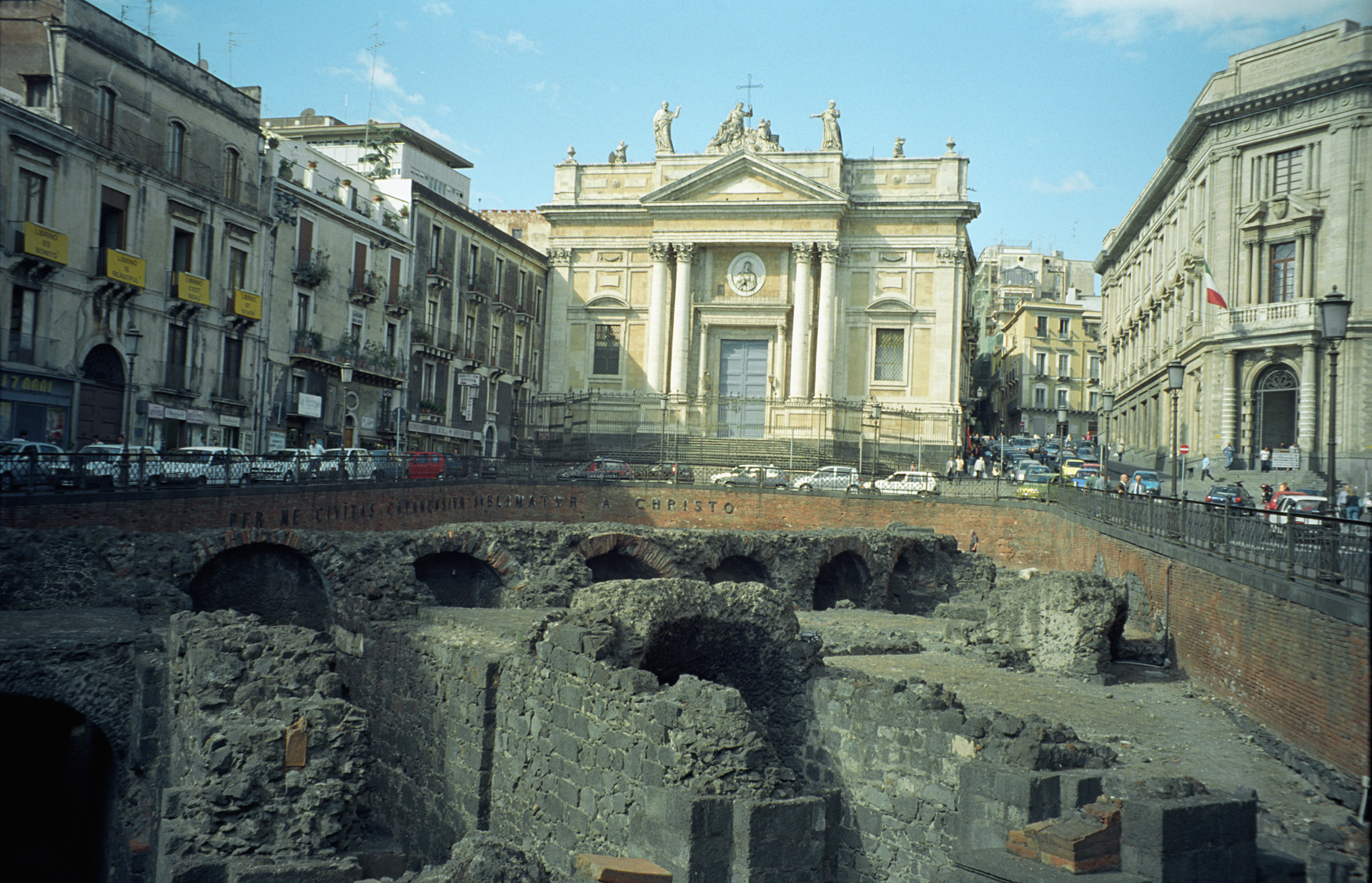 Vista dell'anfiteatro romano e della chiesa di sant'Agata alla fornace a Catania.